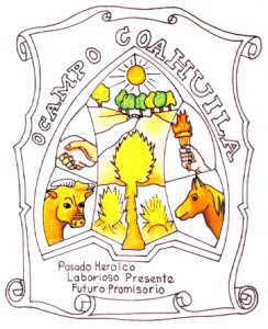 Escudo de armas del municipio de Ocampo, Coahuila